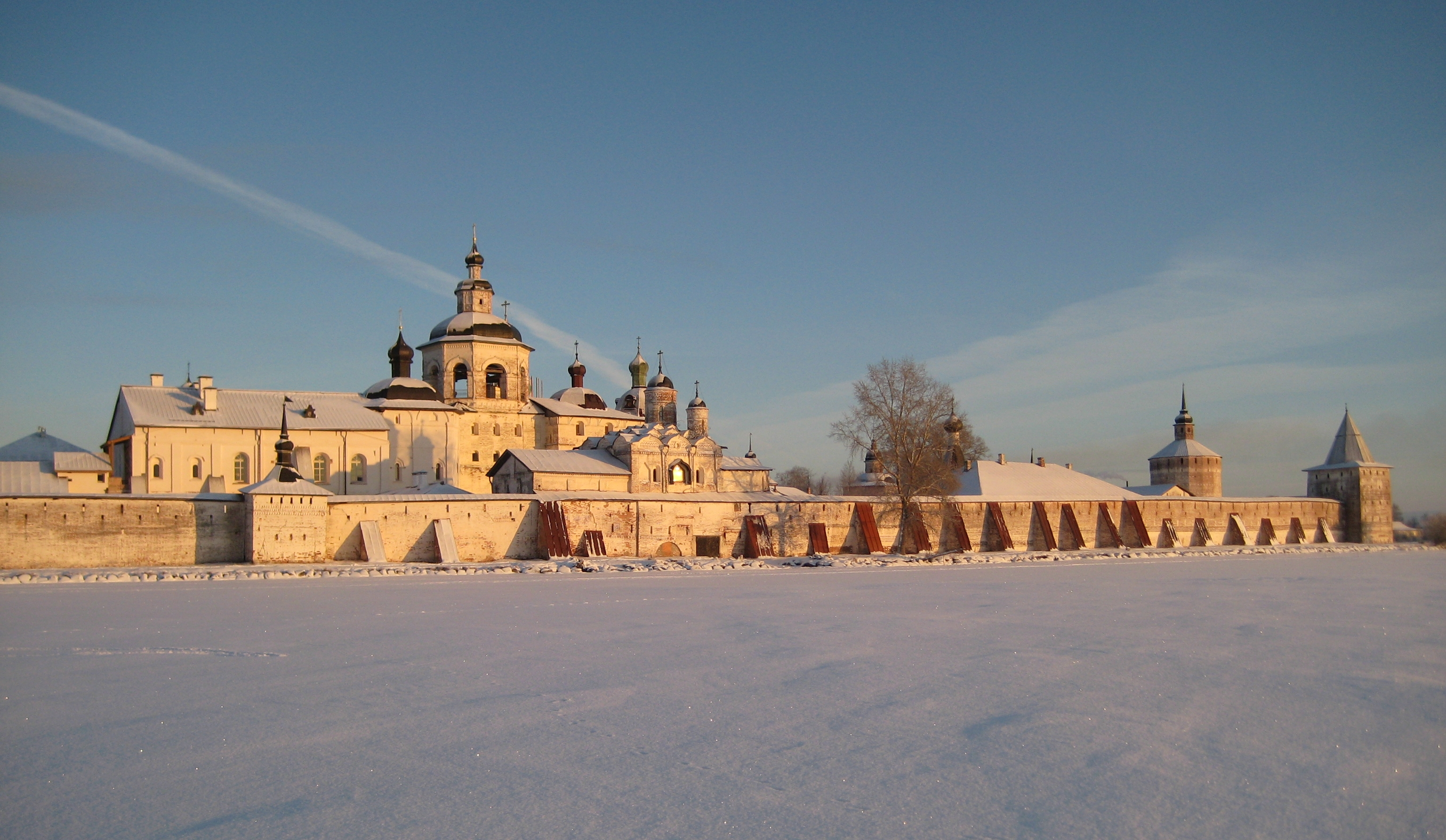 Кирилло-Белозерский монастырь. Вид с озера